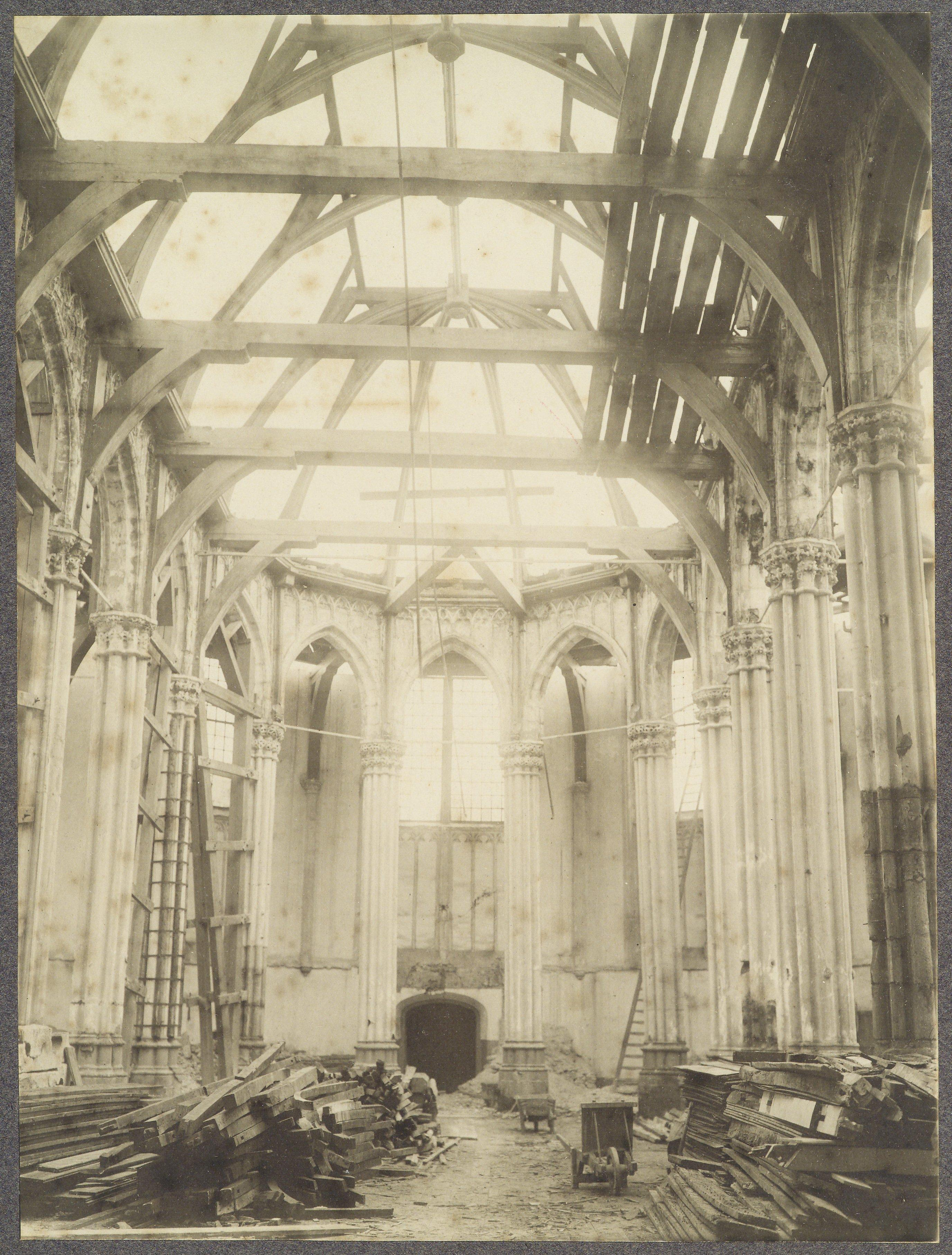 Nieuwe Zijdskapel: Interieur, tijdens de afbraak